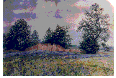 Akvarelo de Jakob Weidmann de la marĉo de Maschwanden en la distrikto Affoltern. Kiel heredanto de Jakob Weidmann mi posedas la kopirajtojn pri fotoj de la bildoj, kies originalo troviĝas en mia galerio. Tiu-ĉi foto estas uzebla libere laŭ kondiĉoj de GNU 1.2. Kategorio:Bildoj de Kantono Zuriko Kategorio:Bildoj alŝutitaj de DidiWeidmann Kategorio:Bildoj faritaj de DidiWeidmann